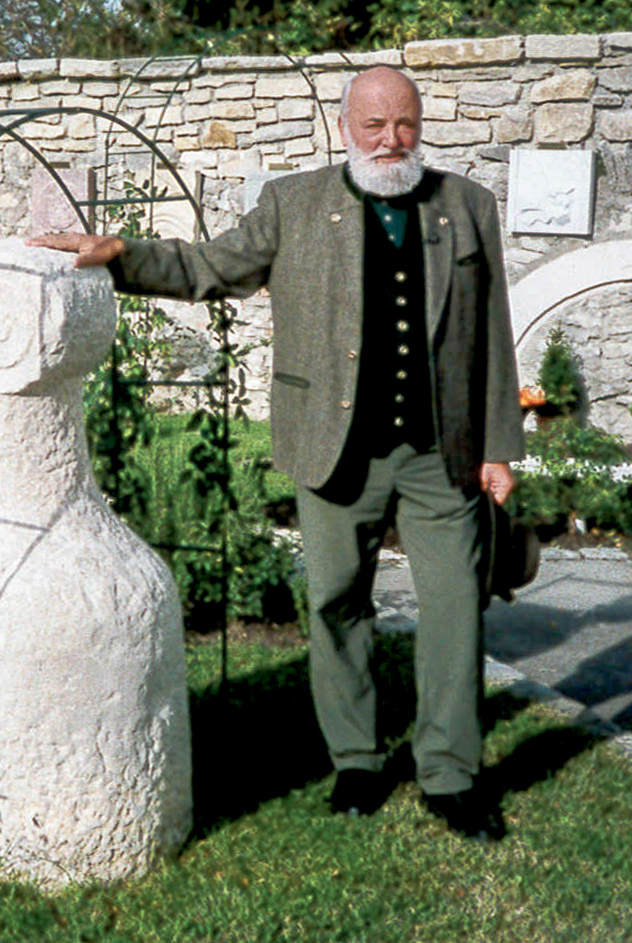 Klingendes Österreich mit Sepp Forcher in Kaisersteinbruch beim Europasymposium Kaisersteinbruch – Europabrunnen